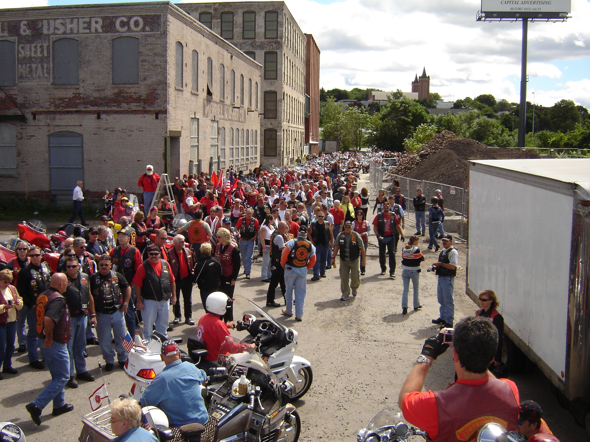 Red Knights member visit the Worcester Cold Sorage Warehouse Fire place